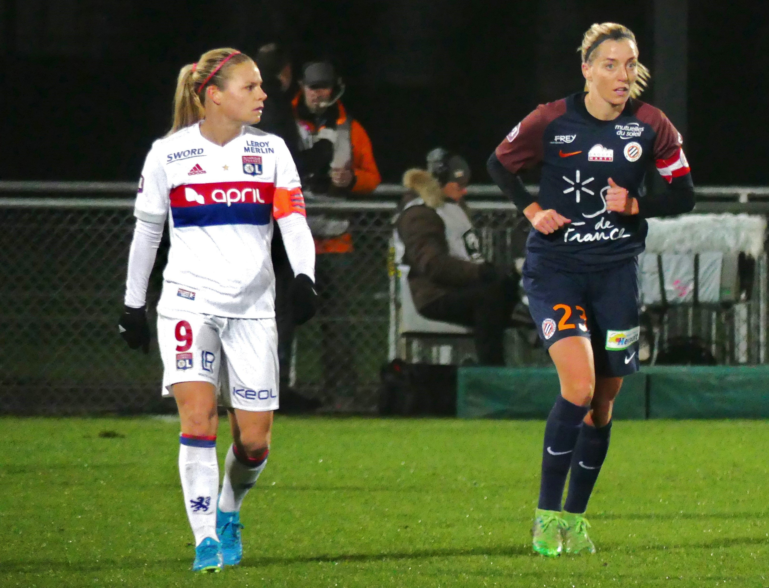 Eugénie Le Sommer et Linda Sembrant lors du match de championnat le 5 février 2018.